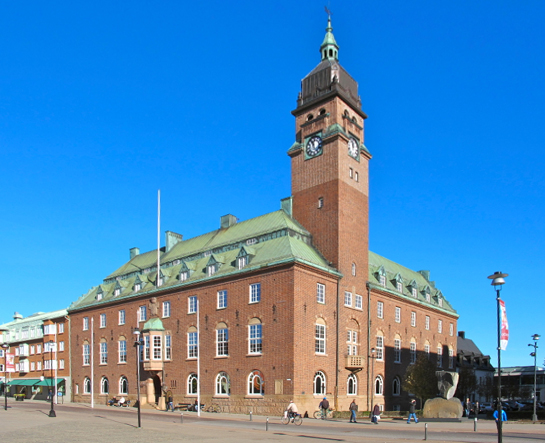 Stadshuset i Nässjö oktober 2013